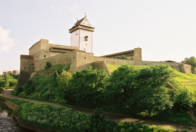 Hermannsfeste in Narva/Estland.